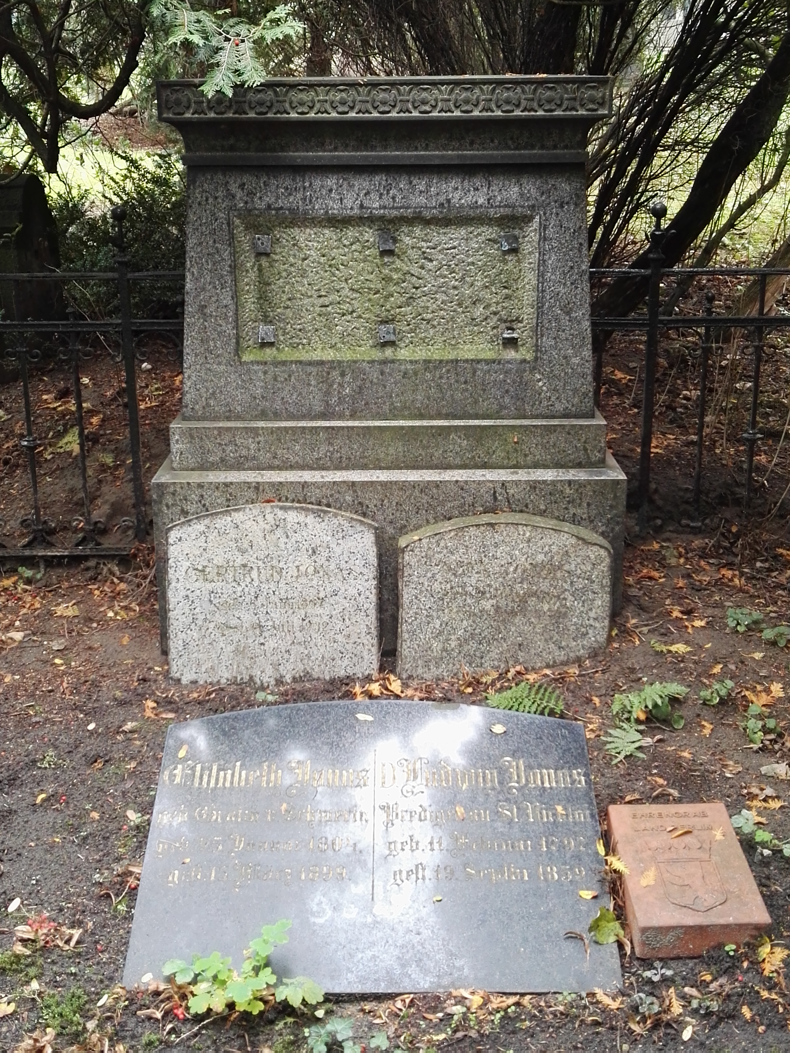 Grab von Ludwig Jonas auf dem St.-Marien- und St.-Nicolai-Friedhof Pankow. Ehrengrab